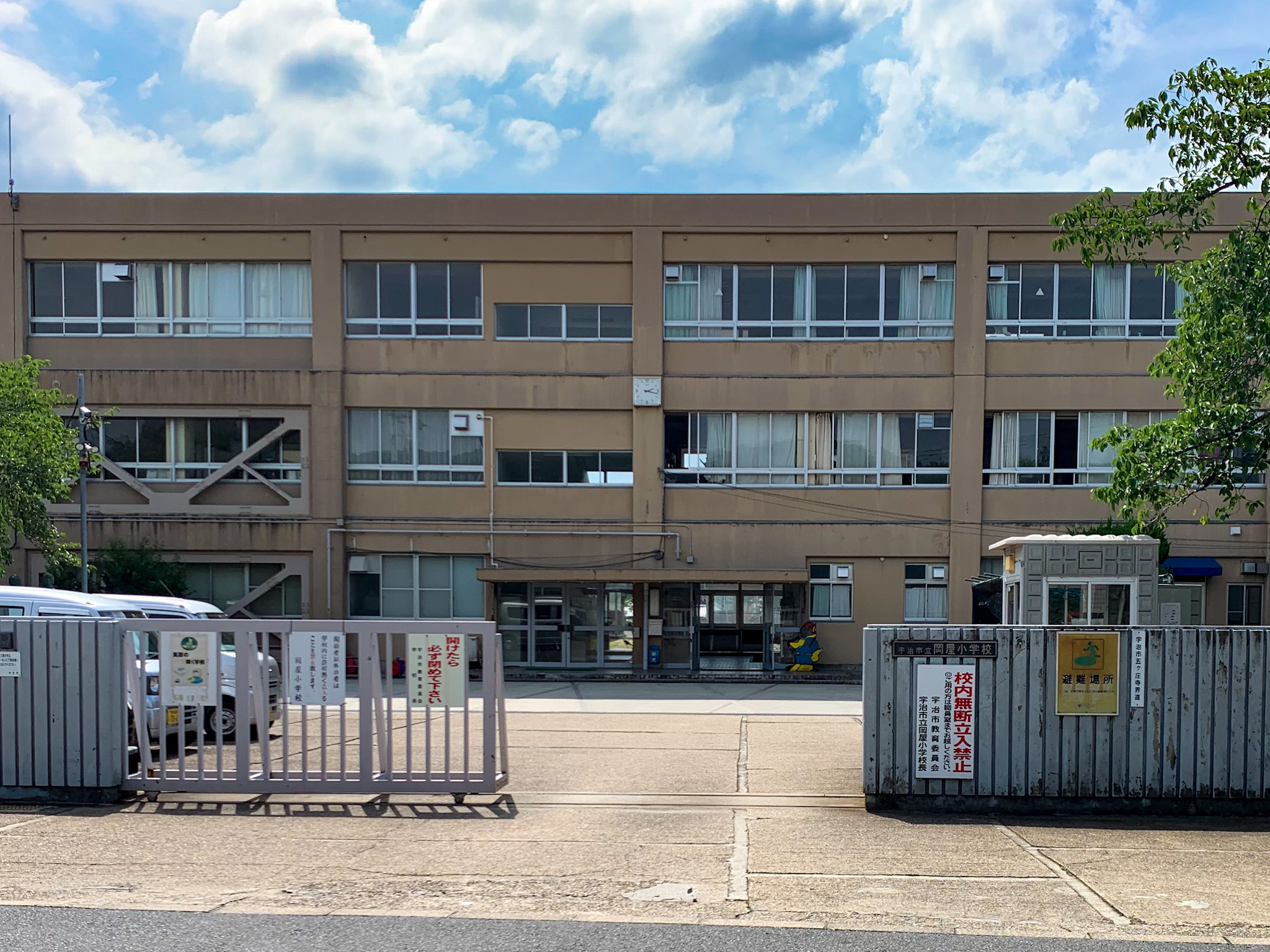 宇治市立岡屋小学校、校門前